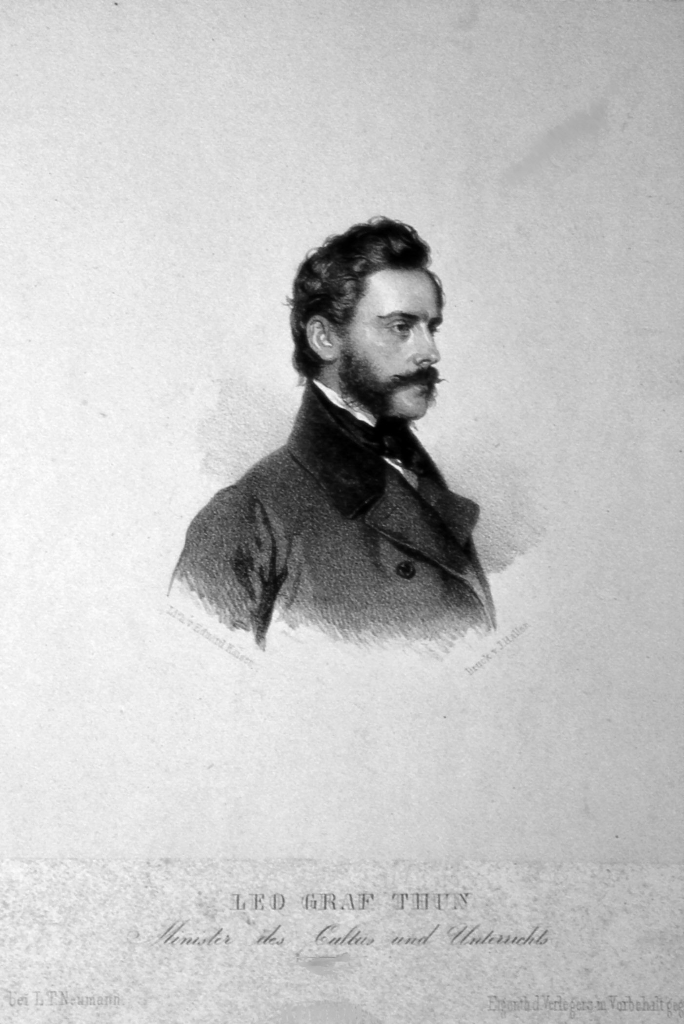 Leo von Thun-Hohenstein, Lithographie von Josef Kriehuber, 1850